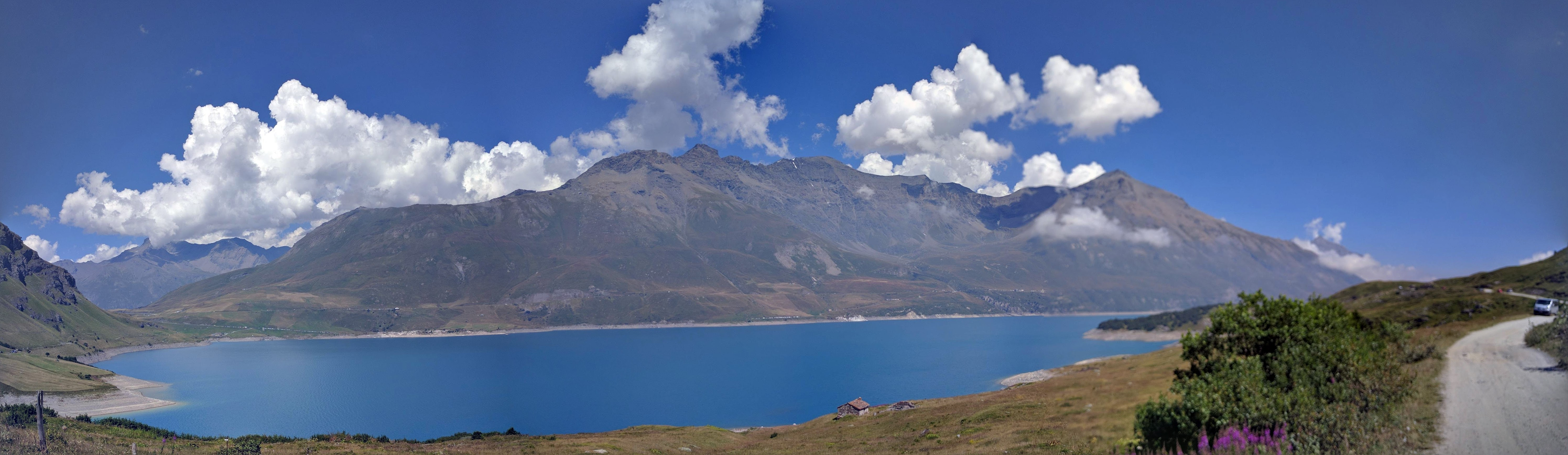 Panorama du lac du Mont-Cenis